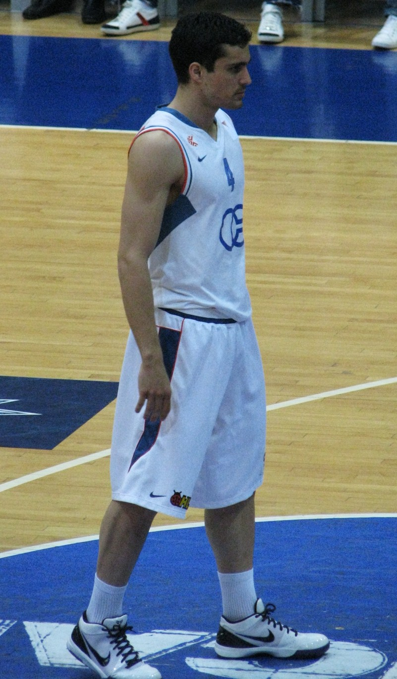 Goran Vrbanc